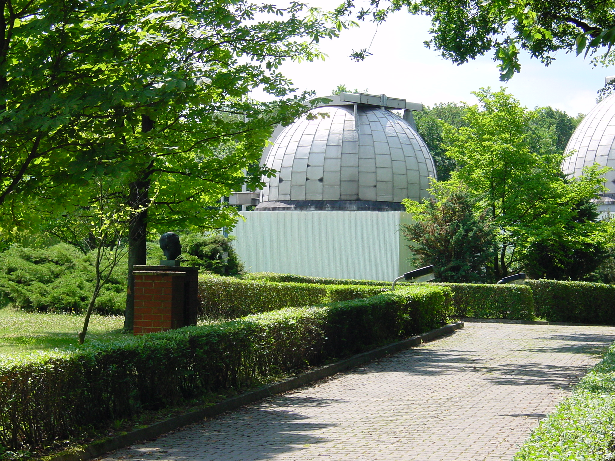 Schulsternwarte "Johannes Franz" in Bautzen. Hornjoserbsce: Šulska hwězdarnja "Johannes Franz" w Budyšinje